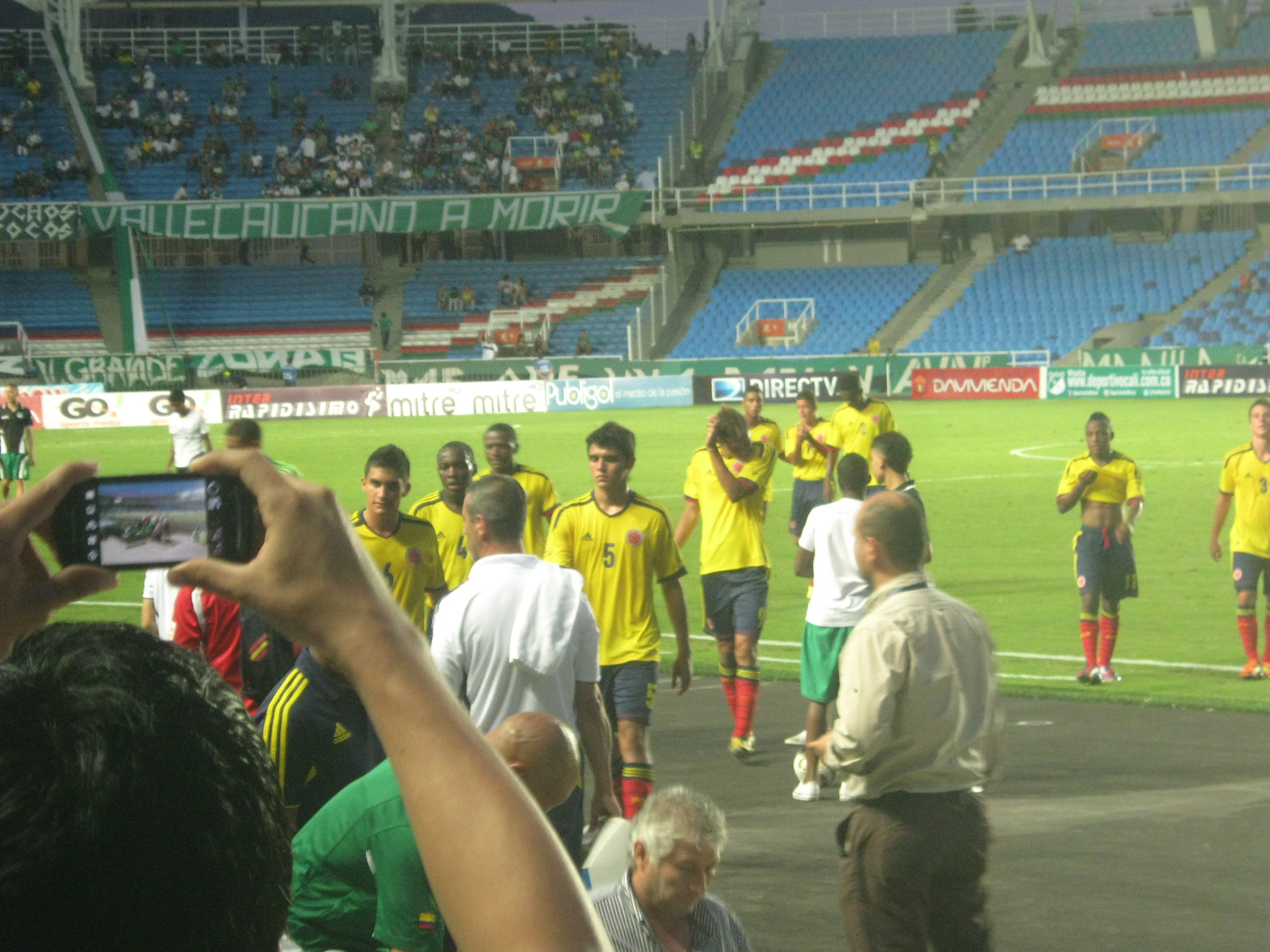 Encuentro amistoso de la Selección Colombia sub 17 contra la Selección de Costa Rica sub 17 en el Pascual Guerrero. Previo al partido por la 12° fecha entre el Deportivo Cali y el Quindío